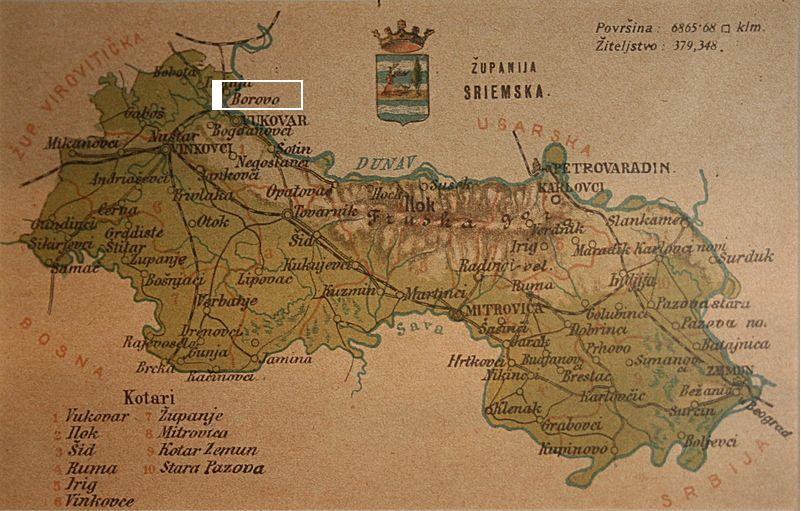 Zemljovidi županija na razglednicama oko 1900. godine